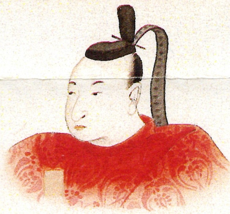 板倉勝澄の肖像。